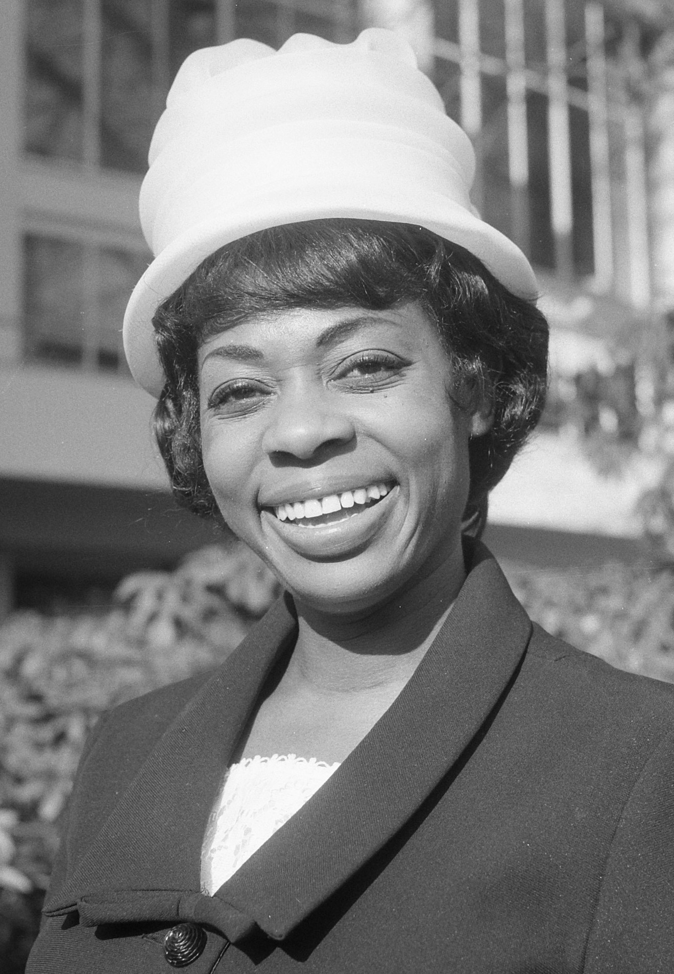 Amerikaans-Belgische jazz-zangers in Kijk de Rijk Show , Donna Higtower na de persconferentie (kop)